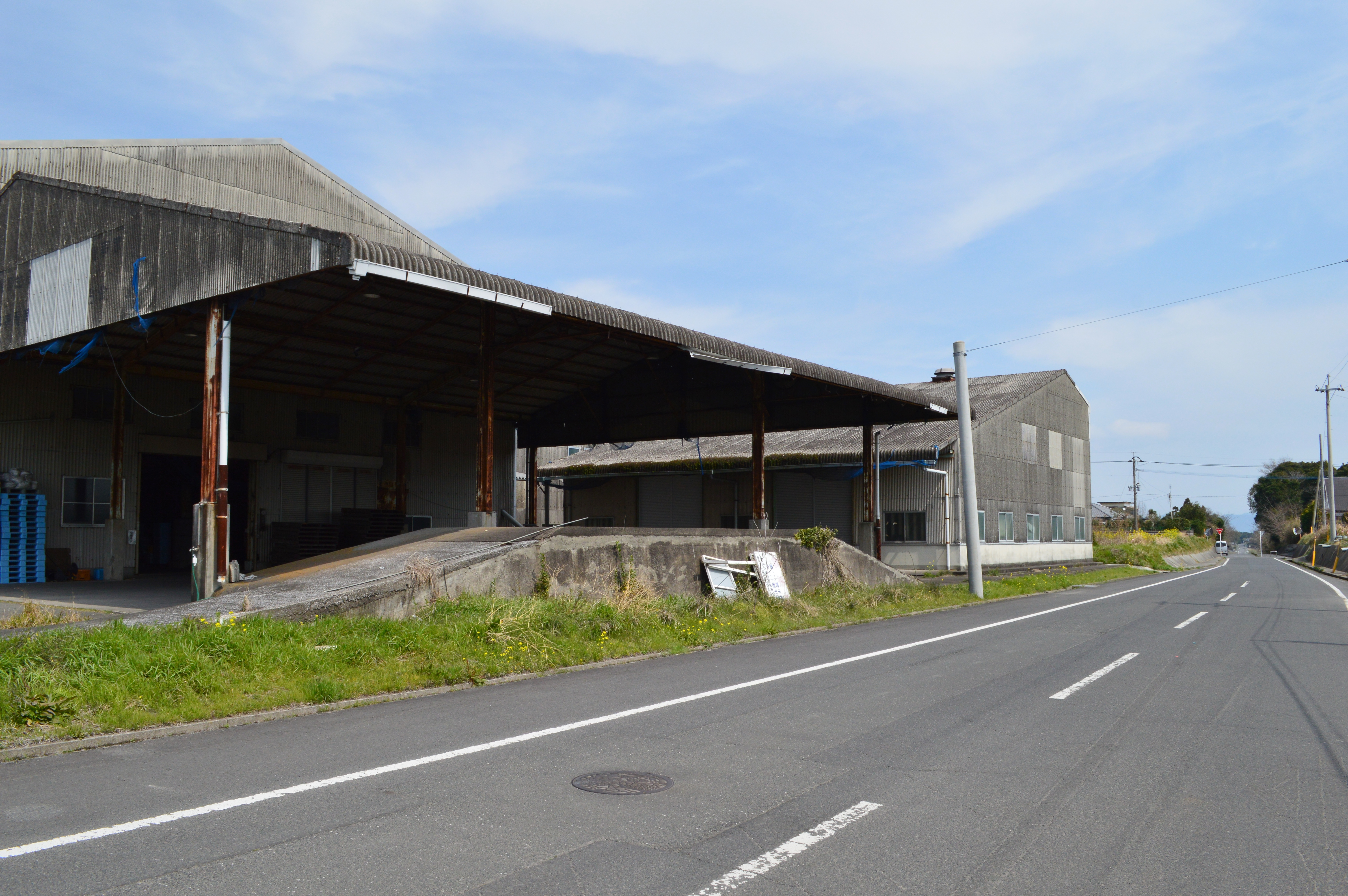 大隅大崎駅跡